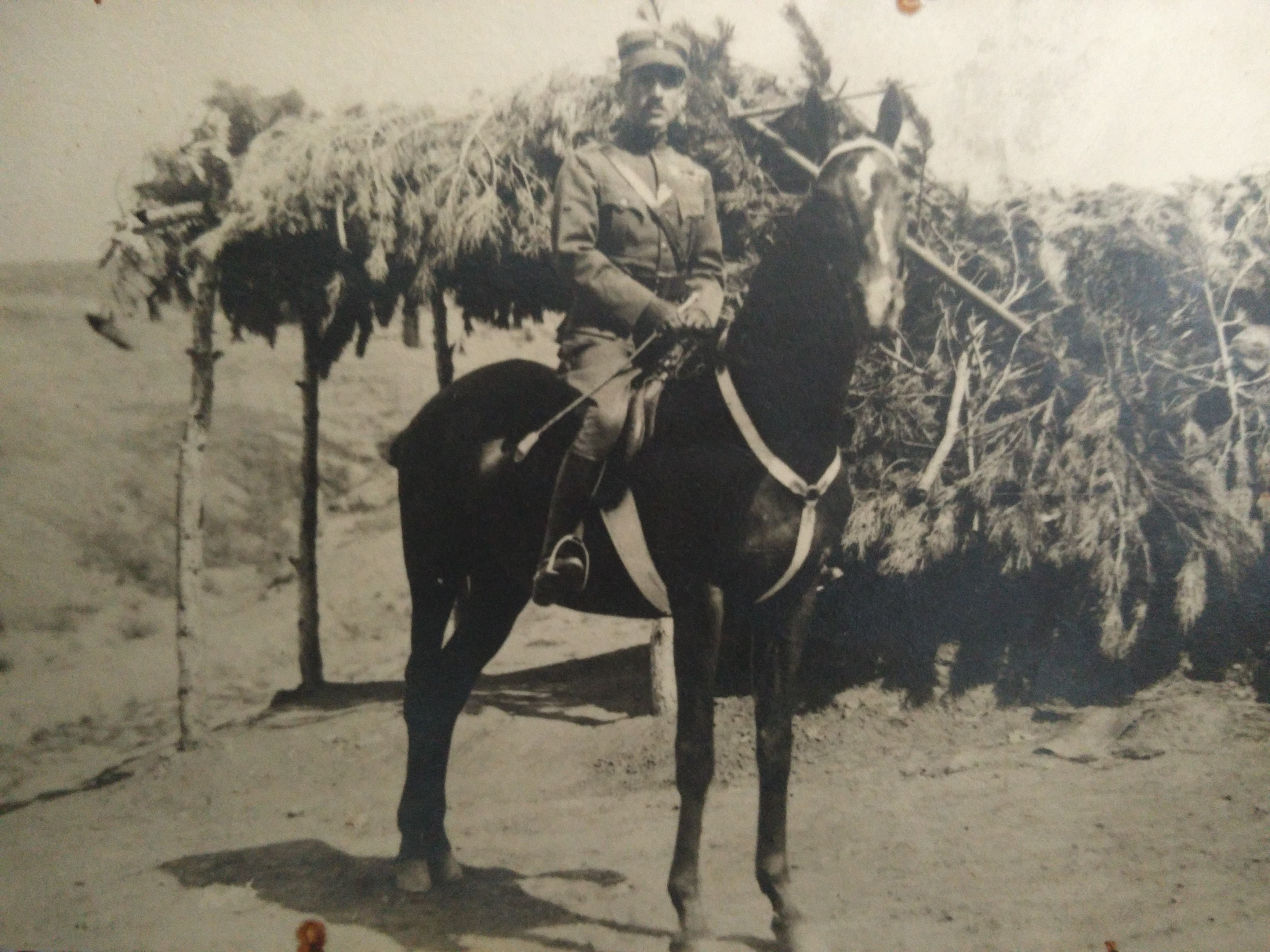 Έφιππος Ιγνάτιος Καλλέργης στην Σμύρνης 1922Türkçe: İzmir'de bir Yunan subay, 1922